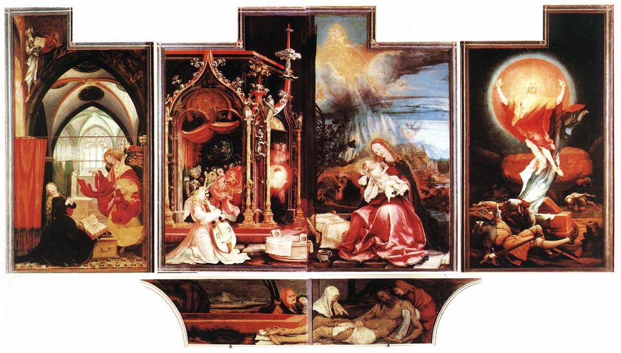 Ołtarz z Isenheim (widok pierwszy), część środkowa: Ukrzyżowanie 269 x 307 cm, skrzydła boczne 269 x 141 cm